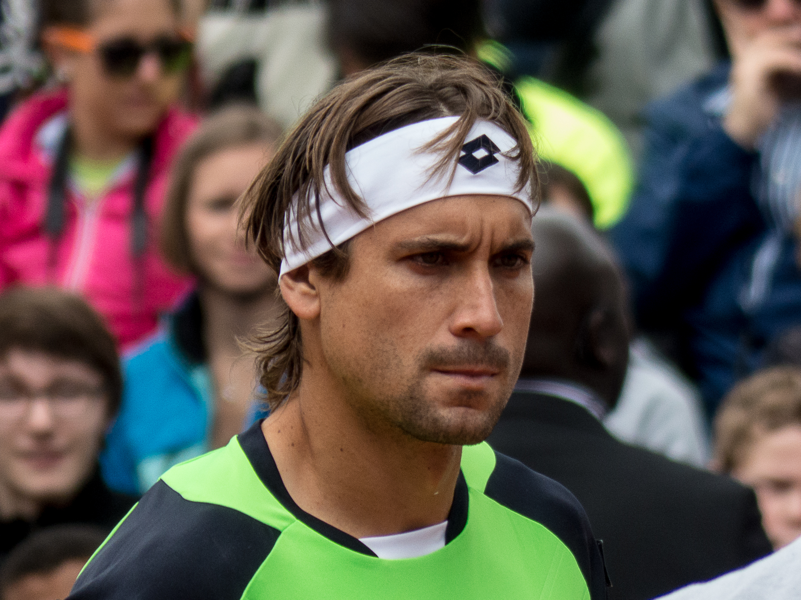 2ème tour Roland Garros 2013 : David Ferrer (ESP) def. Albert Montanes (ESP)